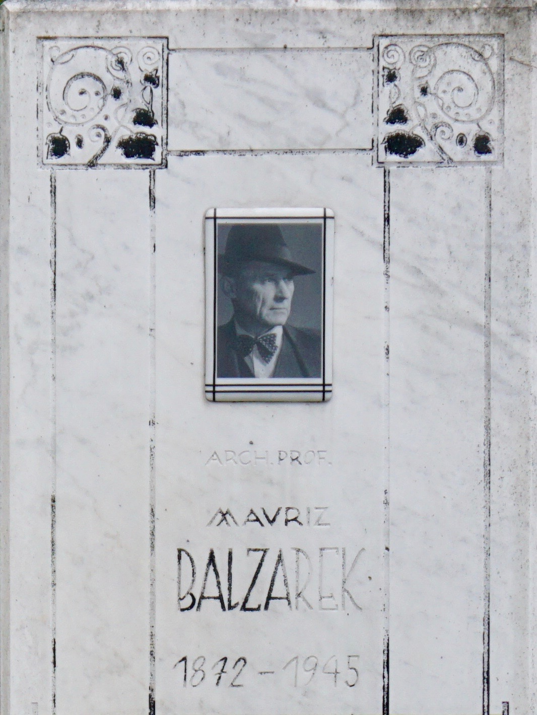 Grab und Grabstein (Teilansicht) von Mauriz Balzarek auf dem St. Barbara-Friedhof in Linz